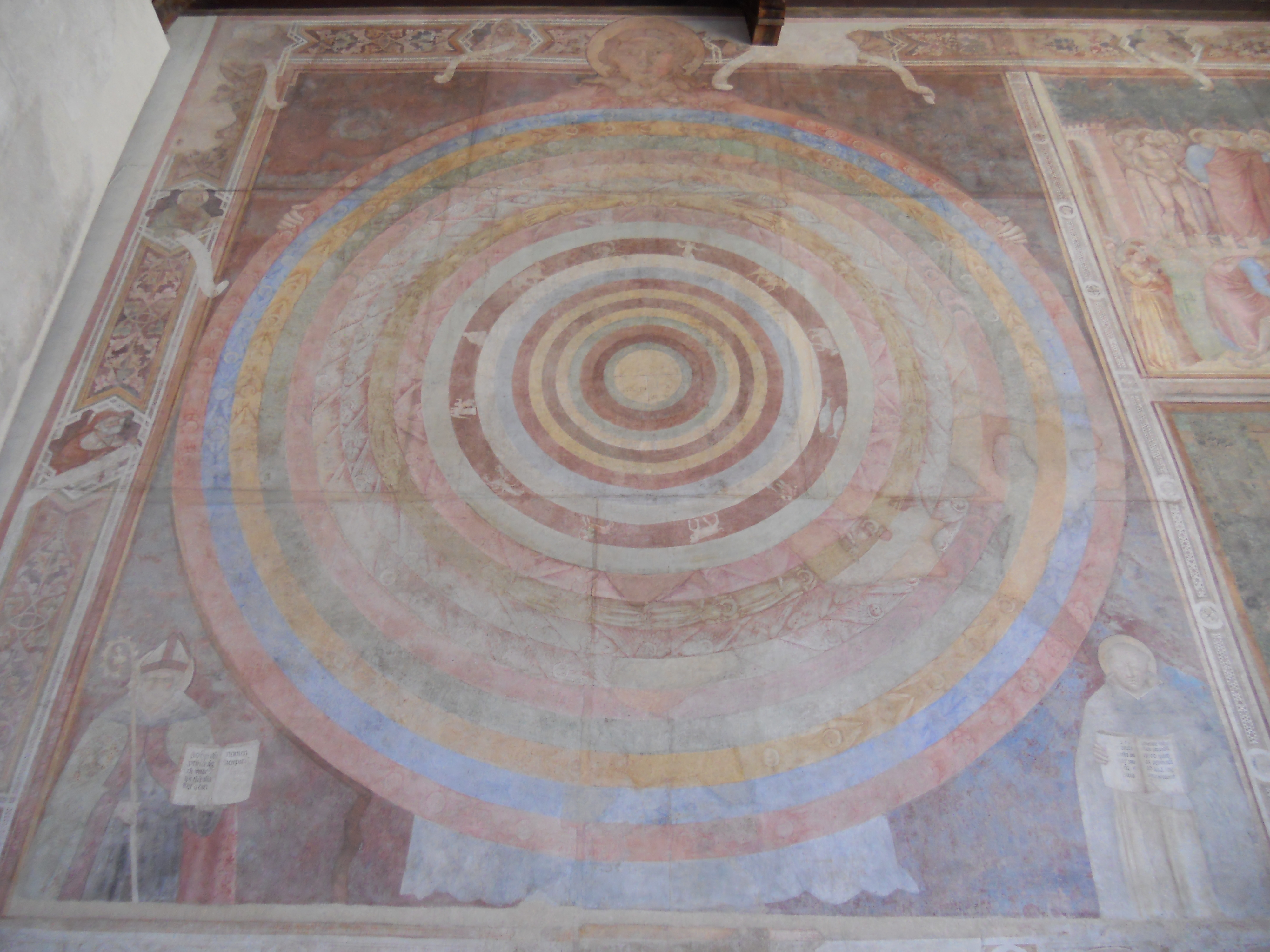 Camposanto monumentale di Pisa, Piero di Puccio, Cosmografia.